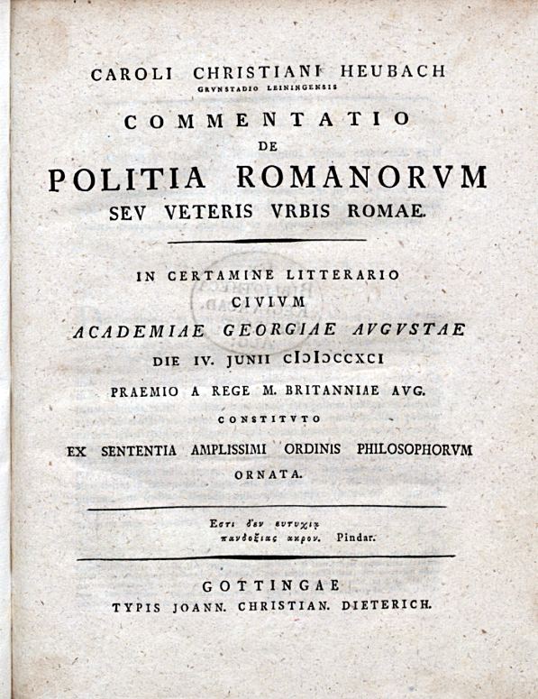 Preisgekrönte (Akademie der Wissenschaften Göttingen) Schrift des Pädagogen Carl Christian Heubach (1769-1797) aus Grünstadt, 1791